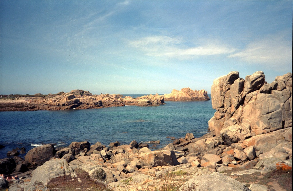 Guernsey landscape 2